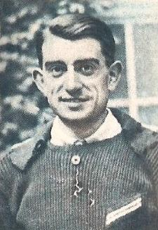 Antonin Magne vers 1935, 'Sprint 71', Panini figurina colorado n°213, p.48.